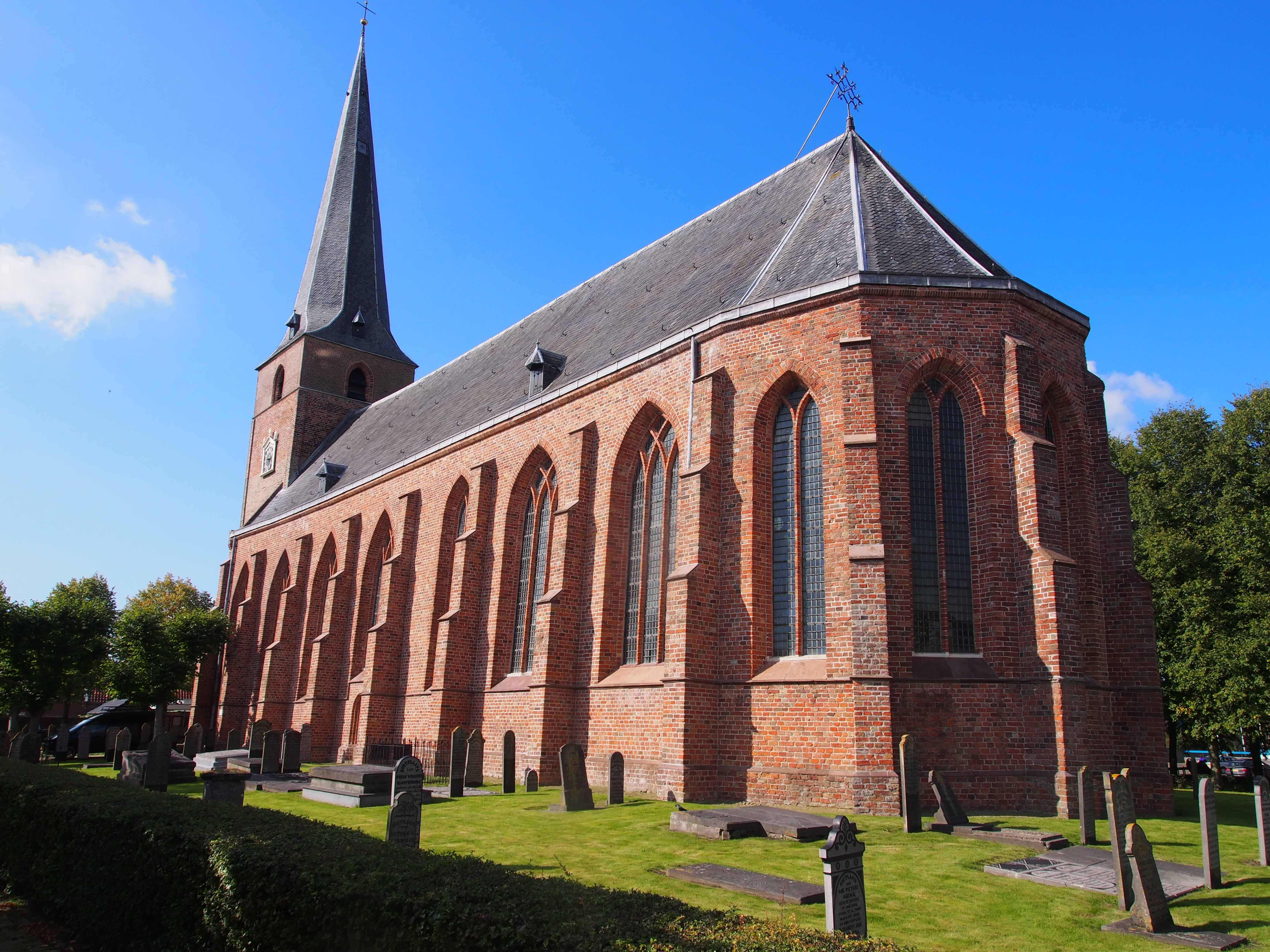 Maartenskerk, Voorstraat 39, Kollum